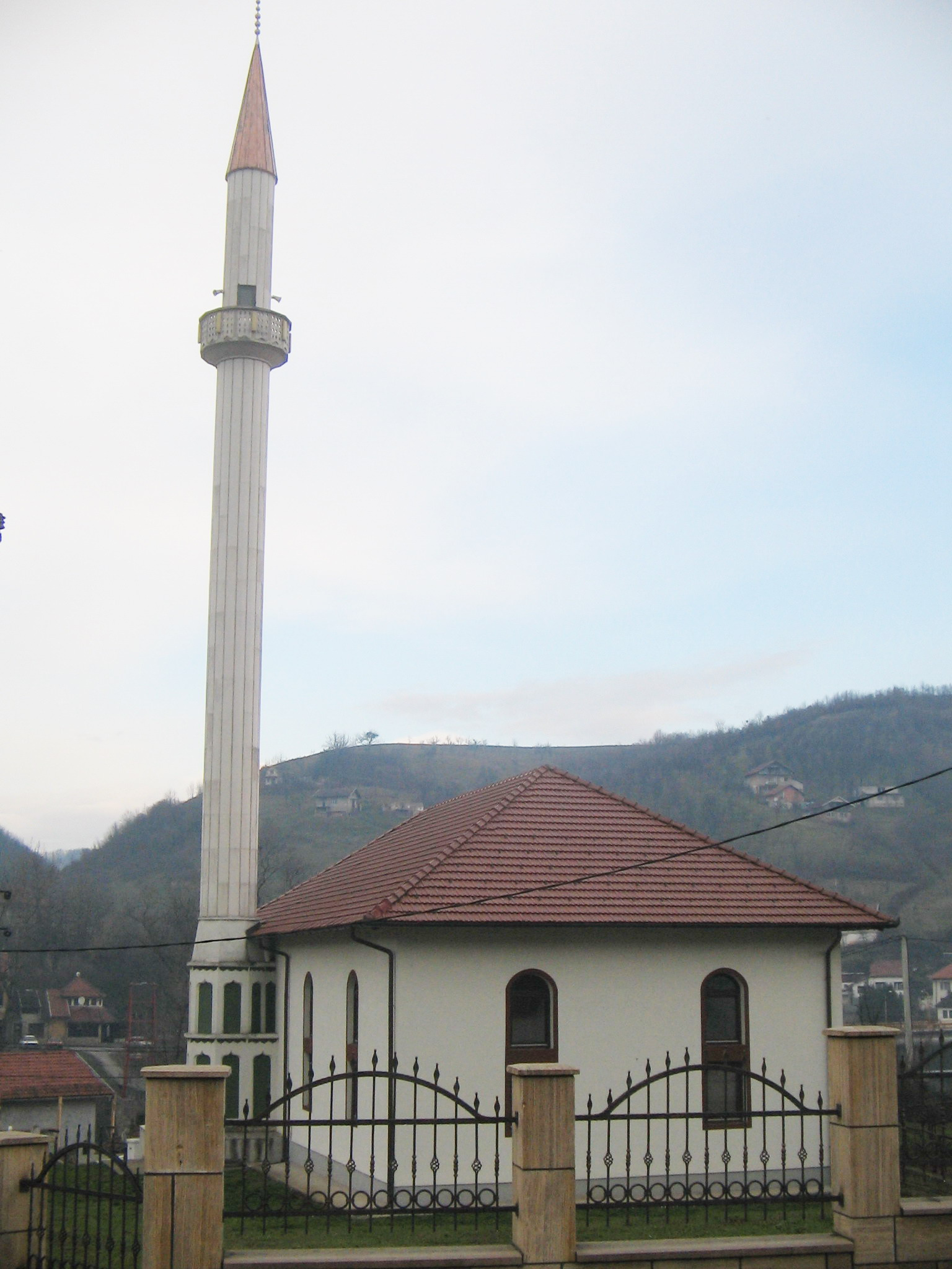 Jama džamija - Sofi Mehmed-pašina džamija (Banja Luka)